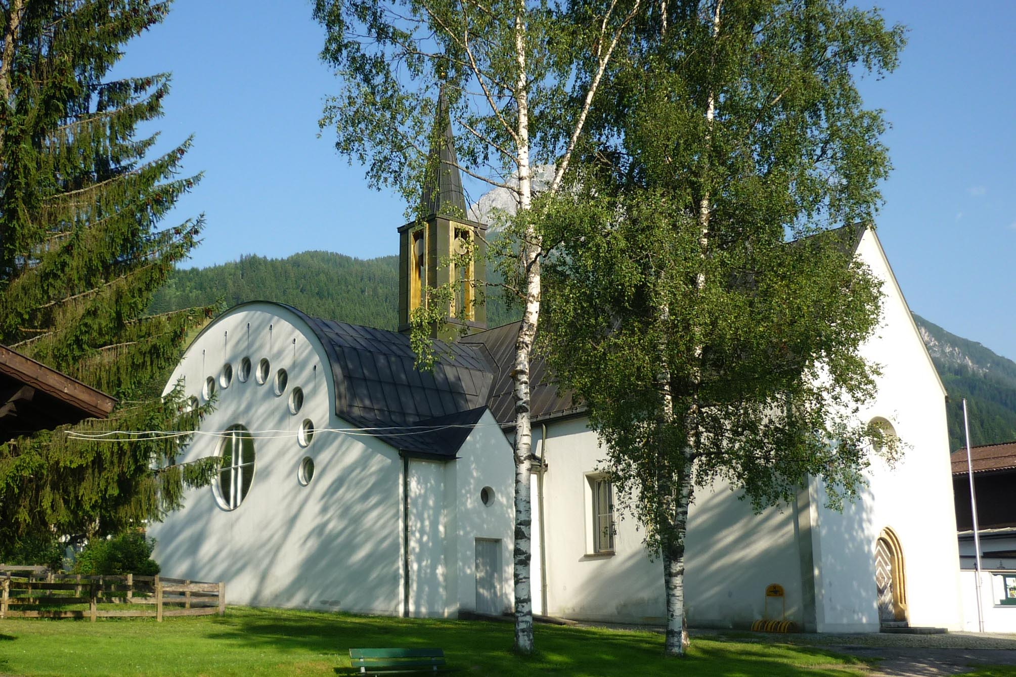 Pfarrkirche hl. Laurentius in Kleinarl